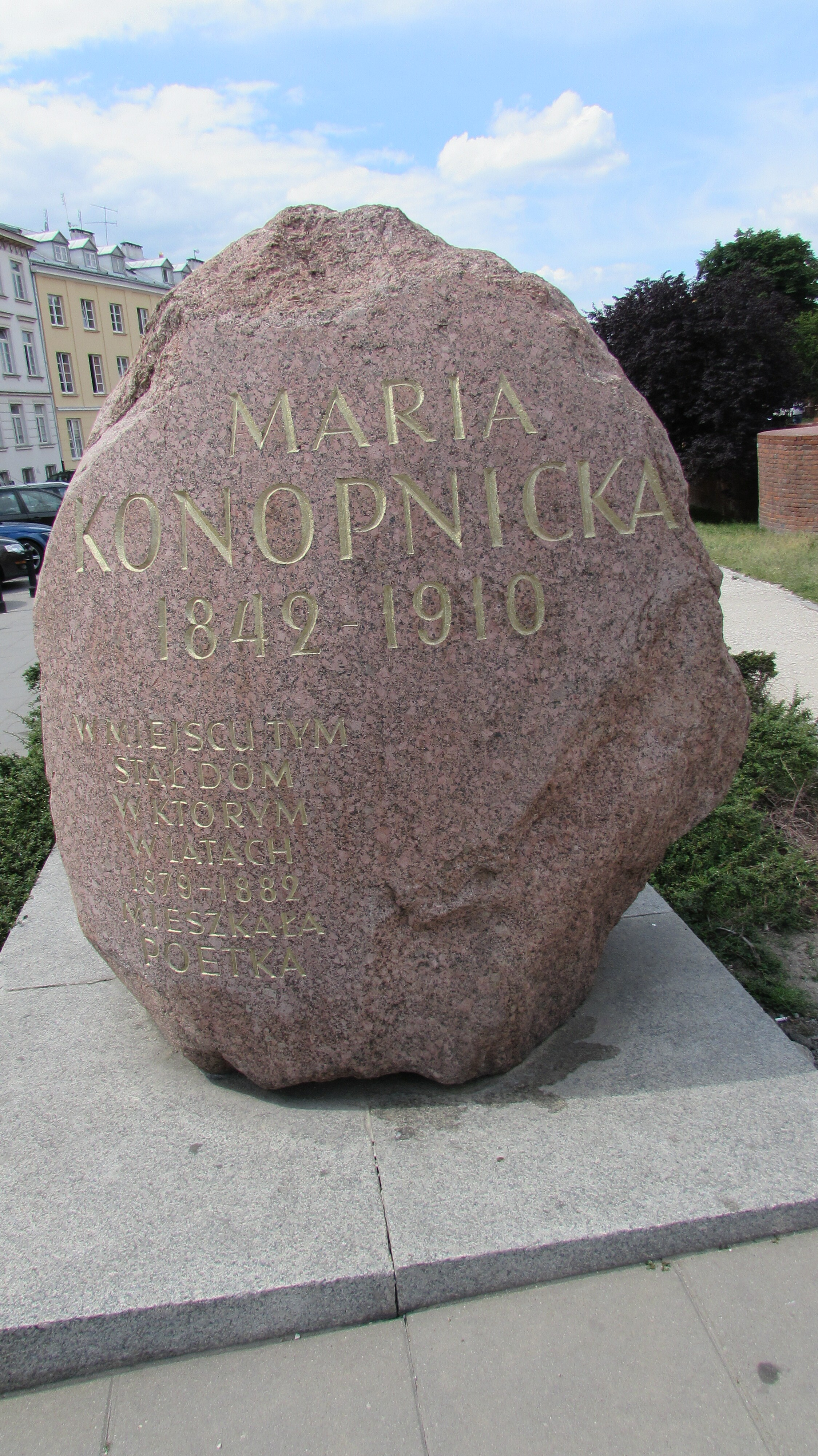 Warschau Maria Konopnicka Gedenkstein